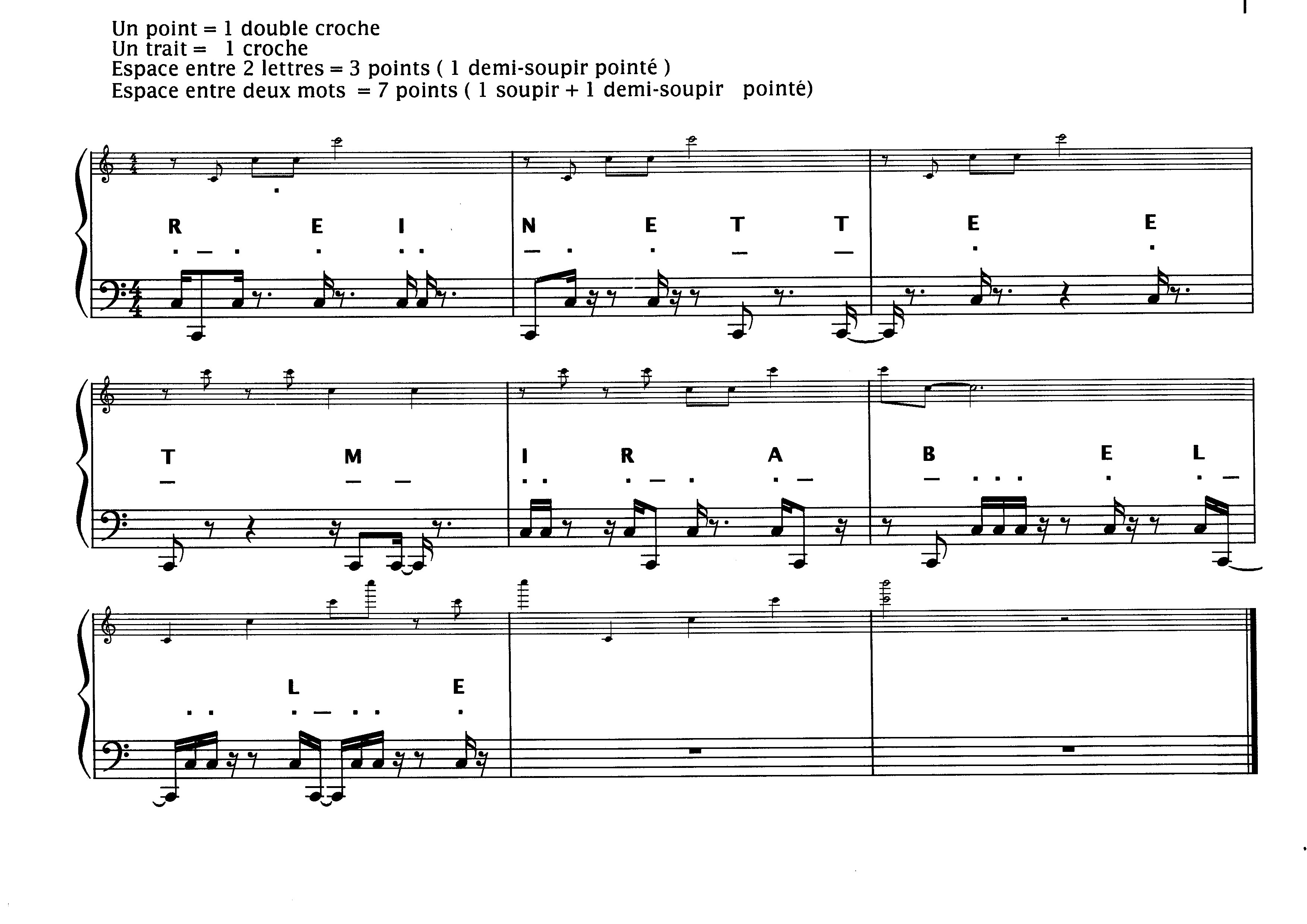 Génération de la musique par le biais d'un texte codé en morse